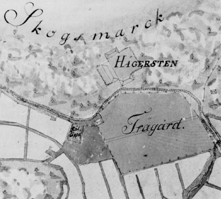 Karta från 1771 med Hägerstens gård